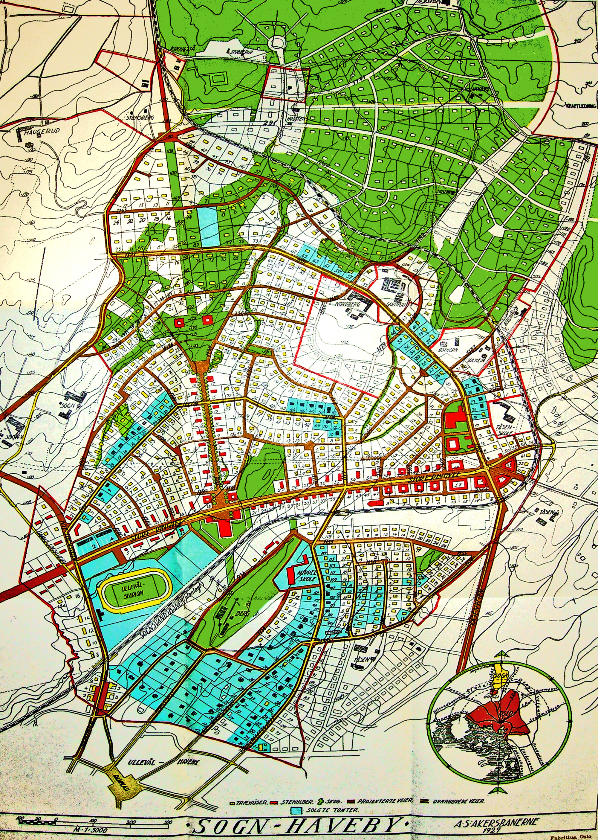 Plan for Sogn haveby